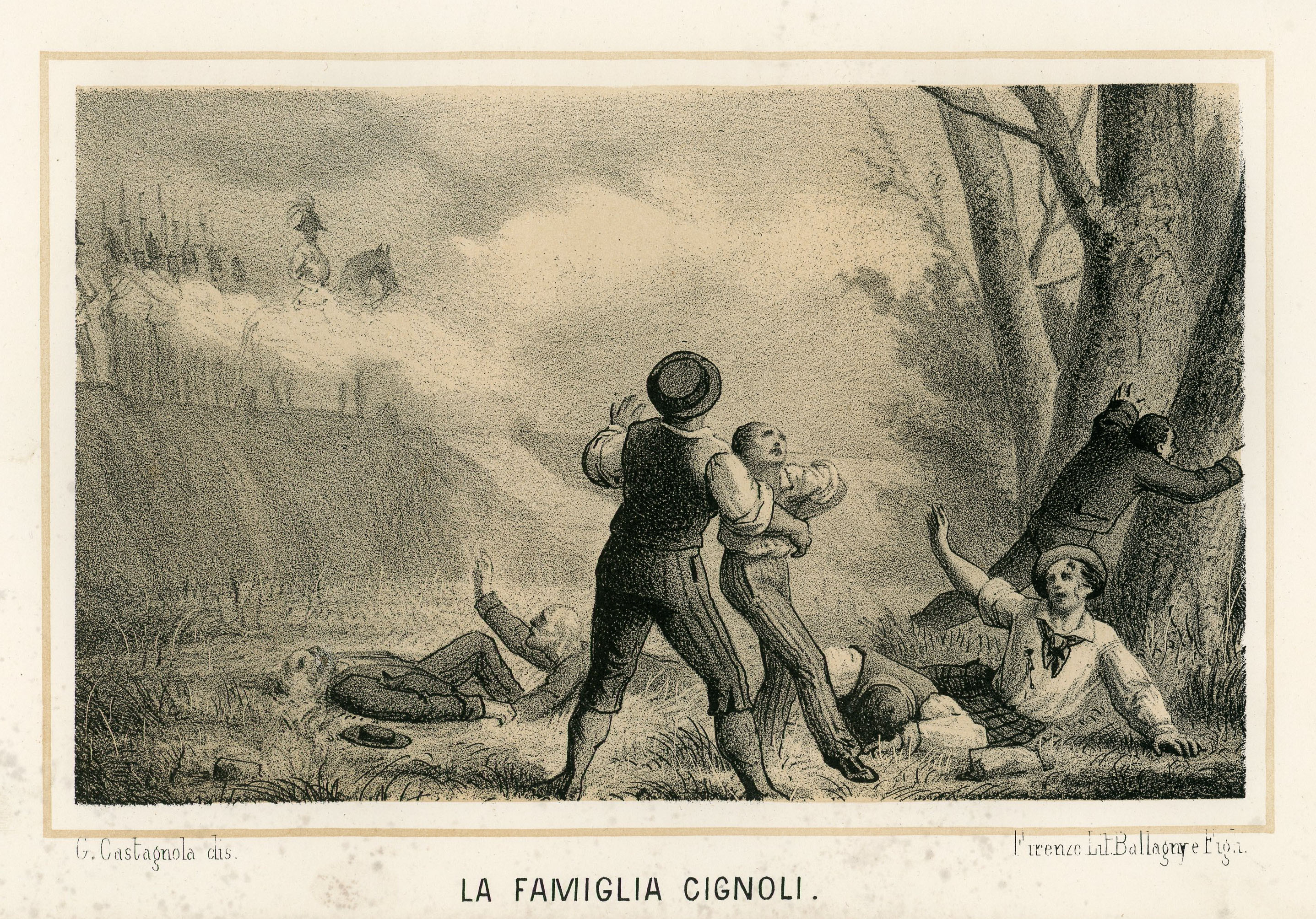 Strage della famiglia Cignoli (litografia).